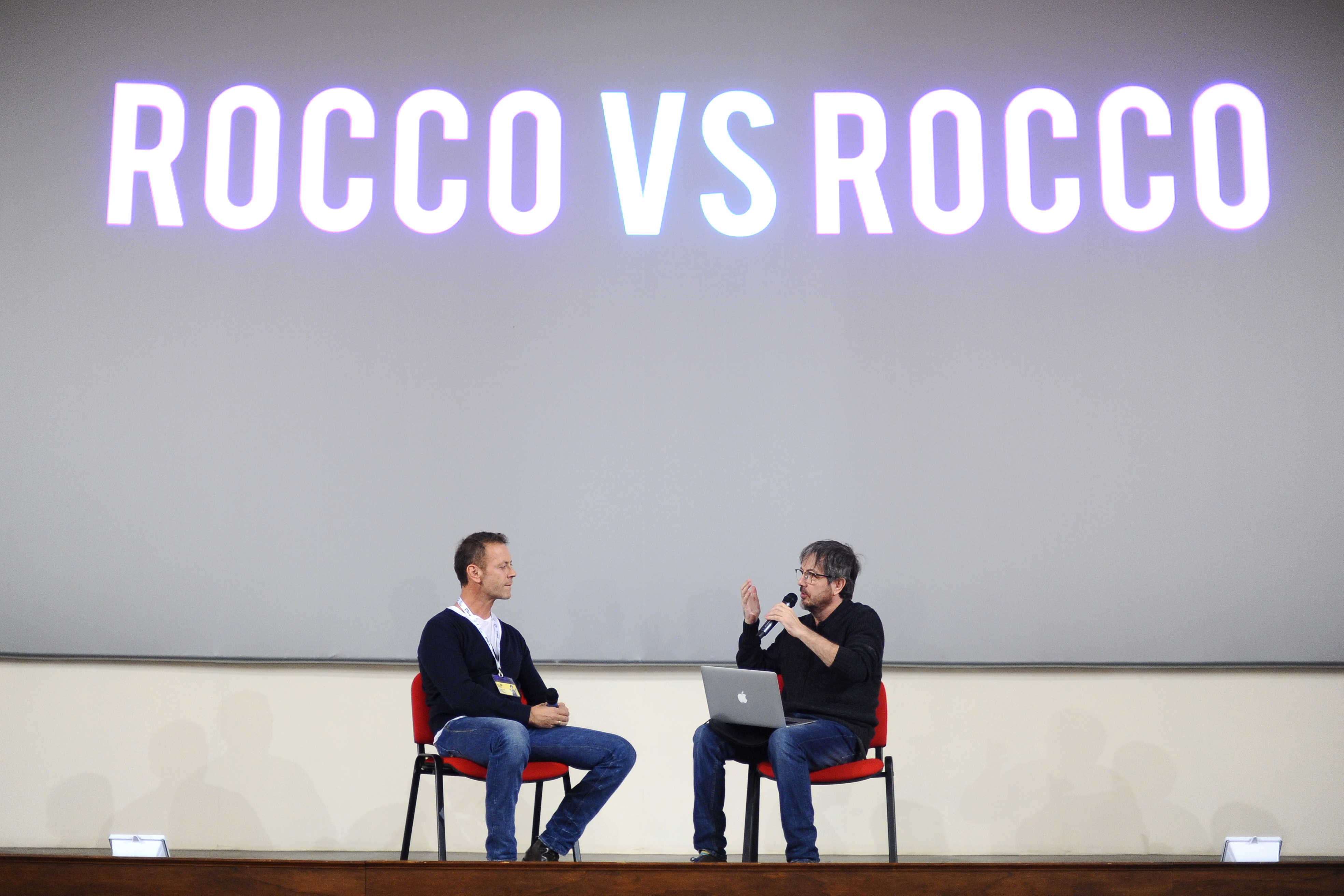 Rocco Siffredi e Rocco Tanica a Lucca Comics & Games 2016. Incontro "Rocco vs Rocco" al Cinema Astra.